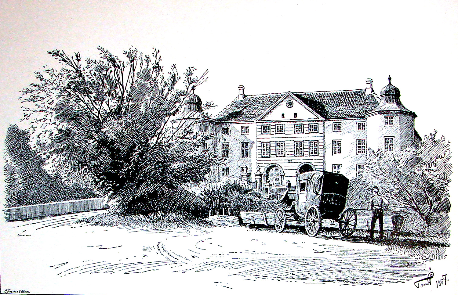 Sandholt er en gammel hovedgård, som nævnes første gang i 1434. Sandholt ligger i Sandholts Lyndelse Sogn, Faaborg-Midtfyn Kommune, Denmark